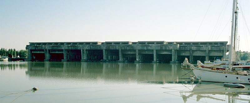 Der Uboot Bunker in Bordeaux